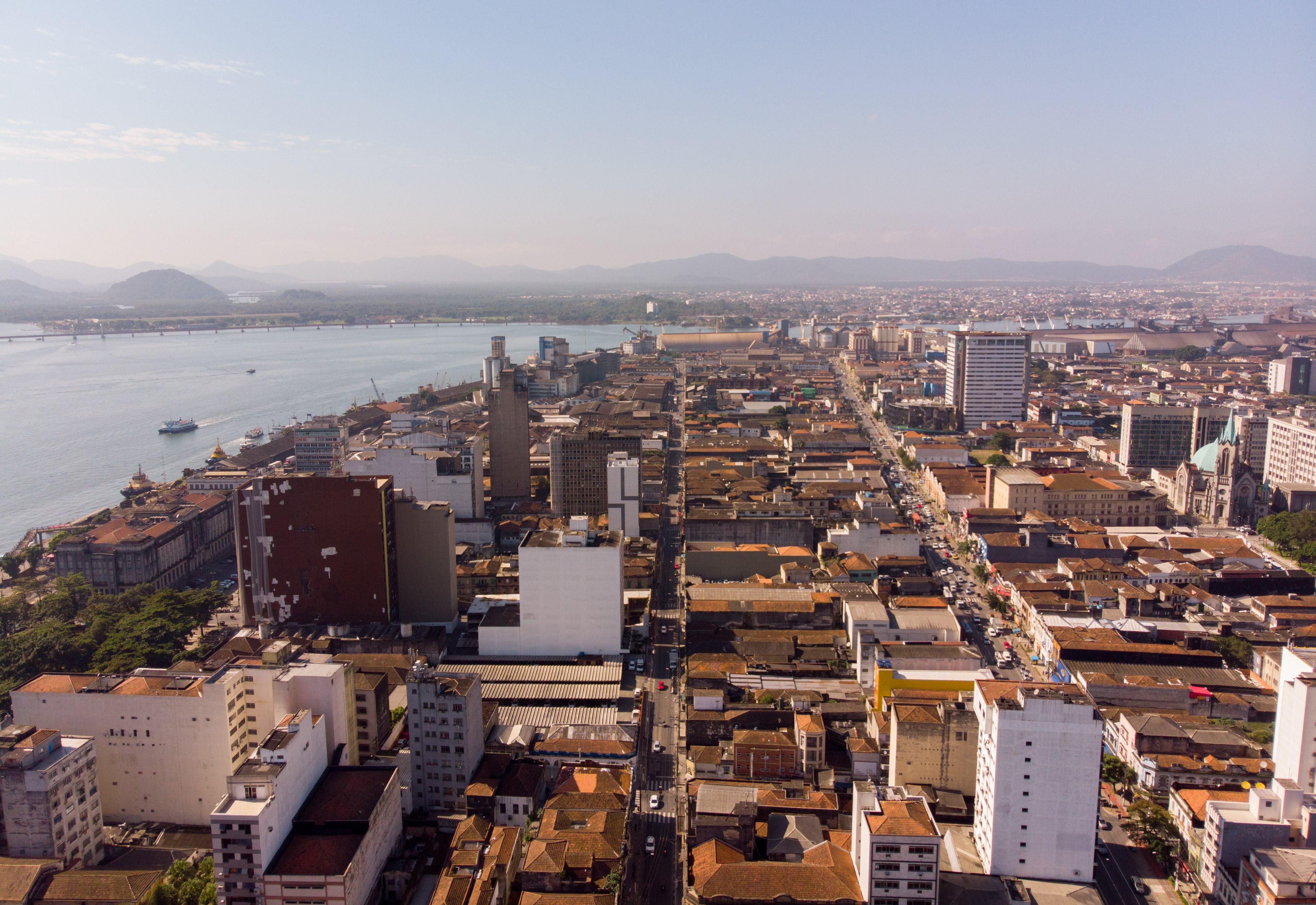 O governador Márcio França, participa do Seminário da TV Tribuna em Santos. Local: Santos/SP Data: 25/06/2018. Foto: Governo do Estado de São Paulo